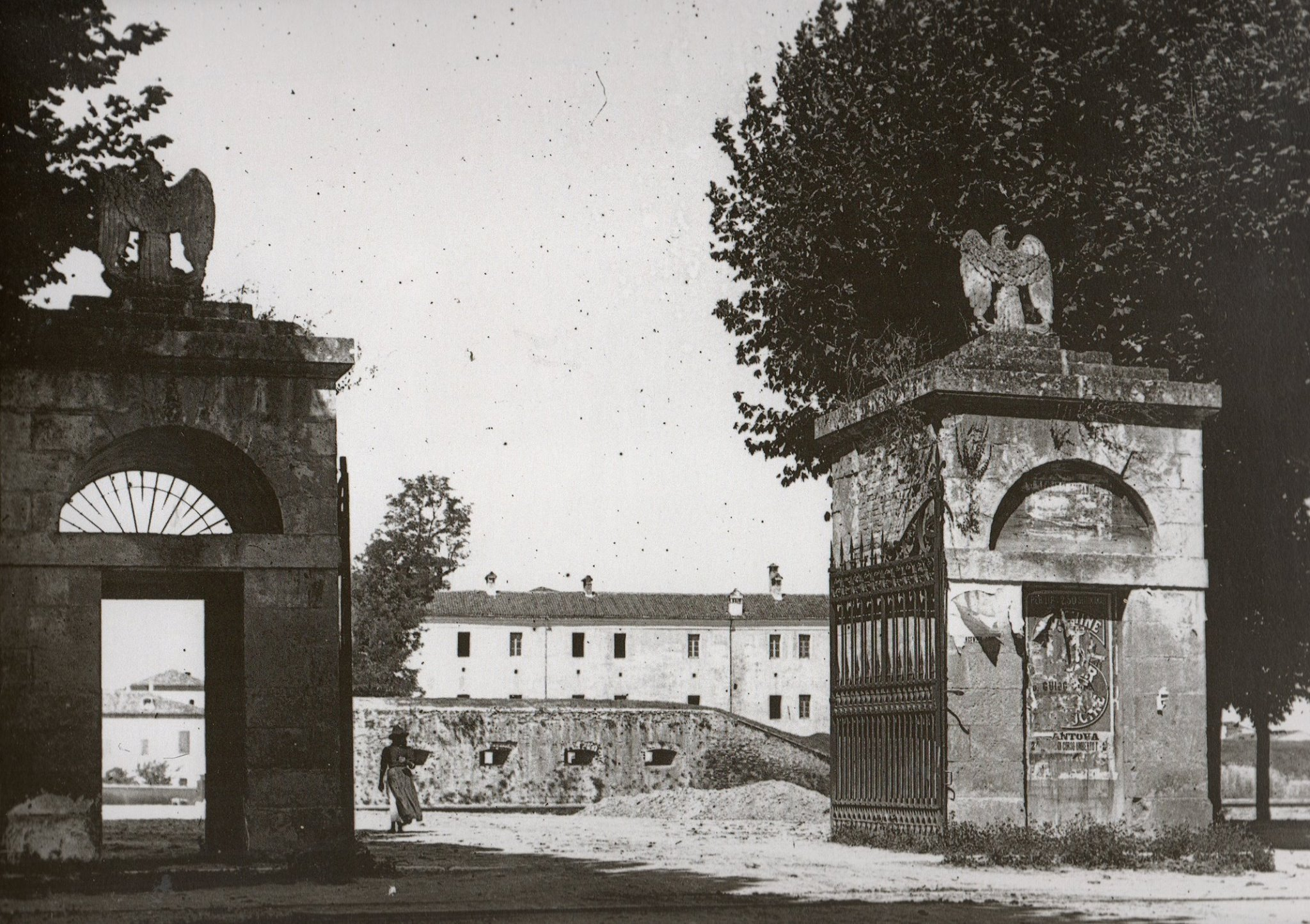 Le aquile di Palazzo Te.